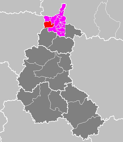 Maps of arrondissements and cantons of France: Arrondissement de Charleville-Mézières - Canton de Rumigny.PNG